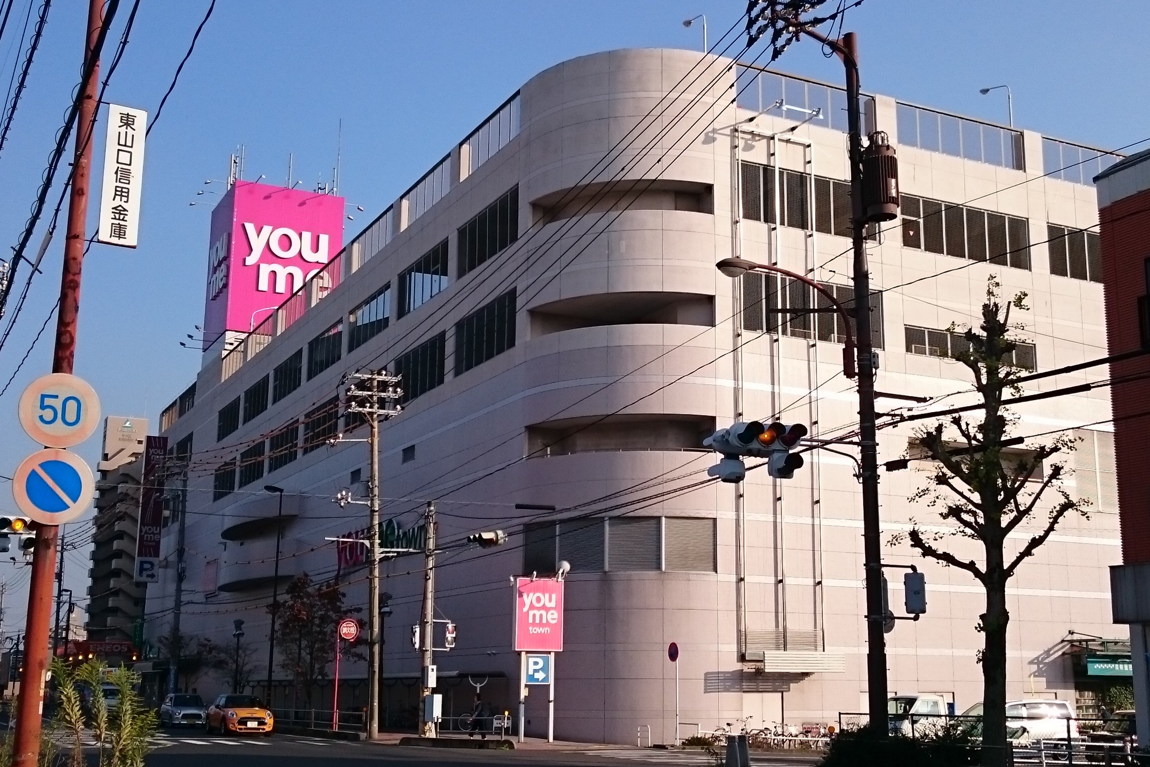 ゆめタウン新南陽 外観